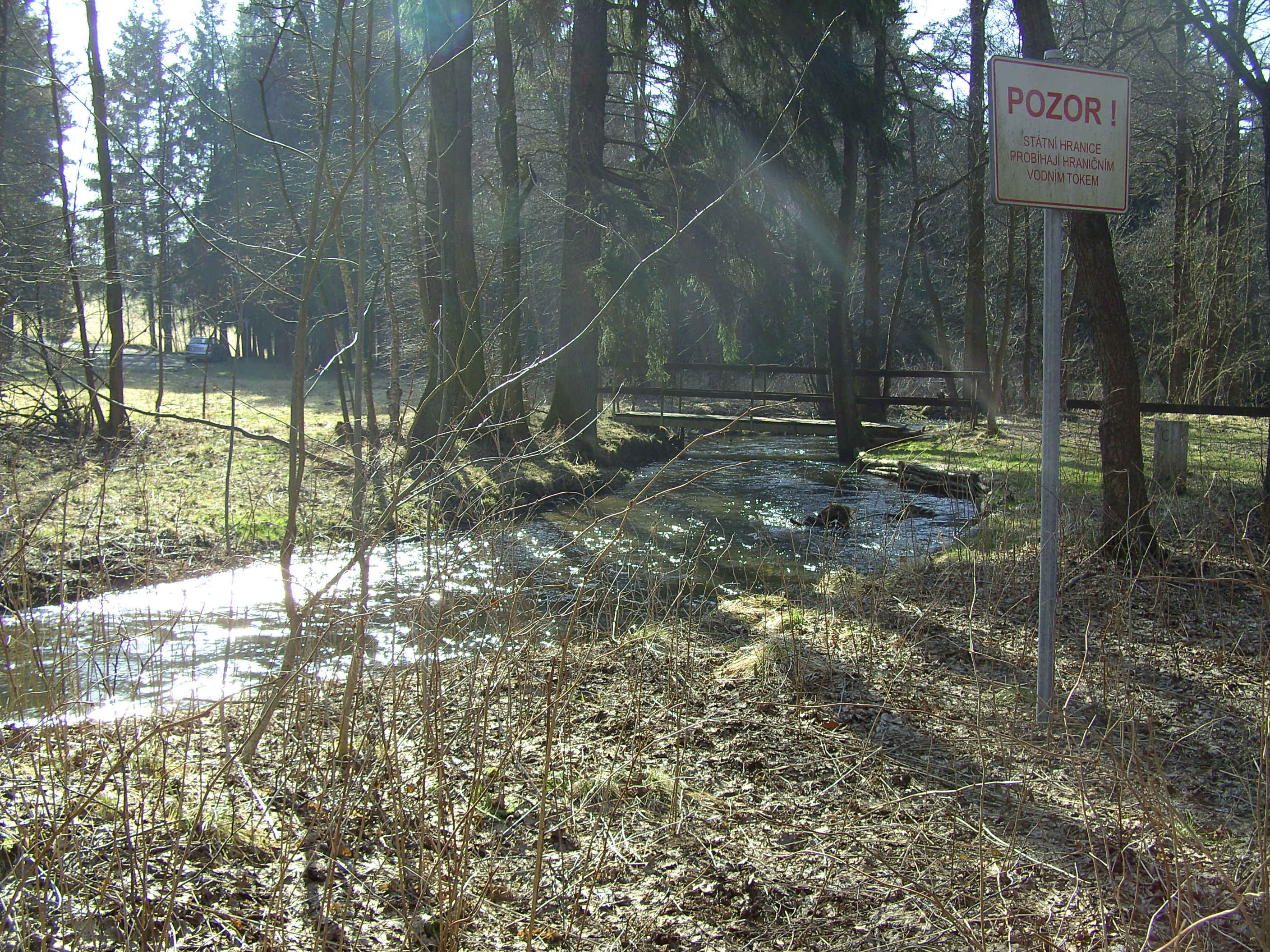 Die Südliche Regnitz am Dreiländereck Bayern-Sachsen-Böhmen